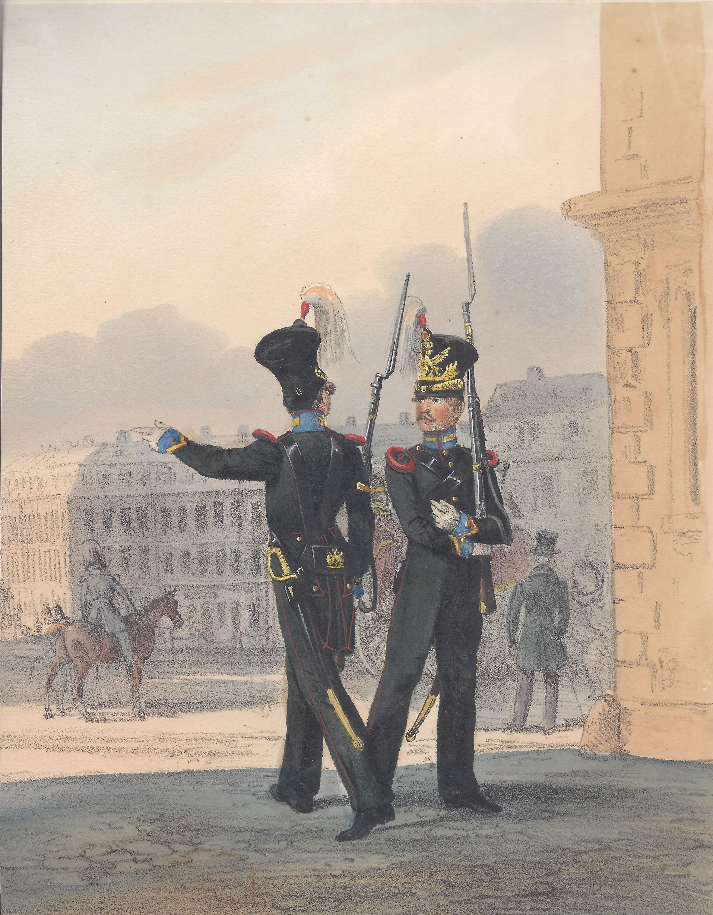 Heinrich Ambros Eckert (1807-1840): Großherzogtum Baden Gendamerie: Brigadier und Gendarme, Lithografie aus: Sämtliche Truppenverbände Europas in Zusammenarbeit mit Dietrich Monten.bei Christian Weiß in Würzburg, 1838-1843.